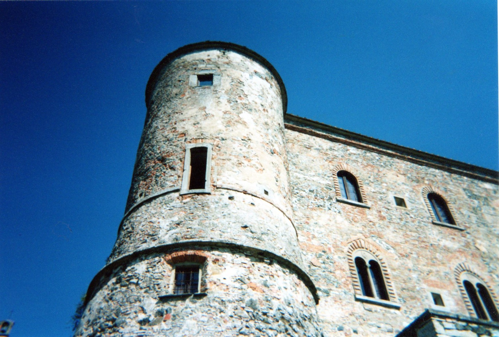 Descrizione = il castello di Montauto, presso Anghiari (AR) - Fonte = fotografia fatta da me - Data = 09-05-2013 - Autore = Darja82 - Licenza = qui sotto - Copyright = qui sotto